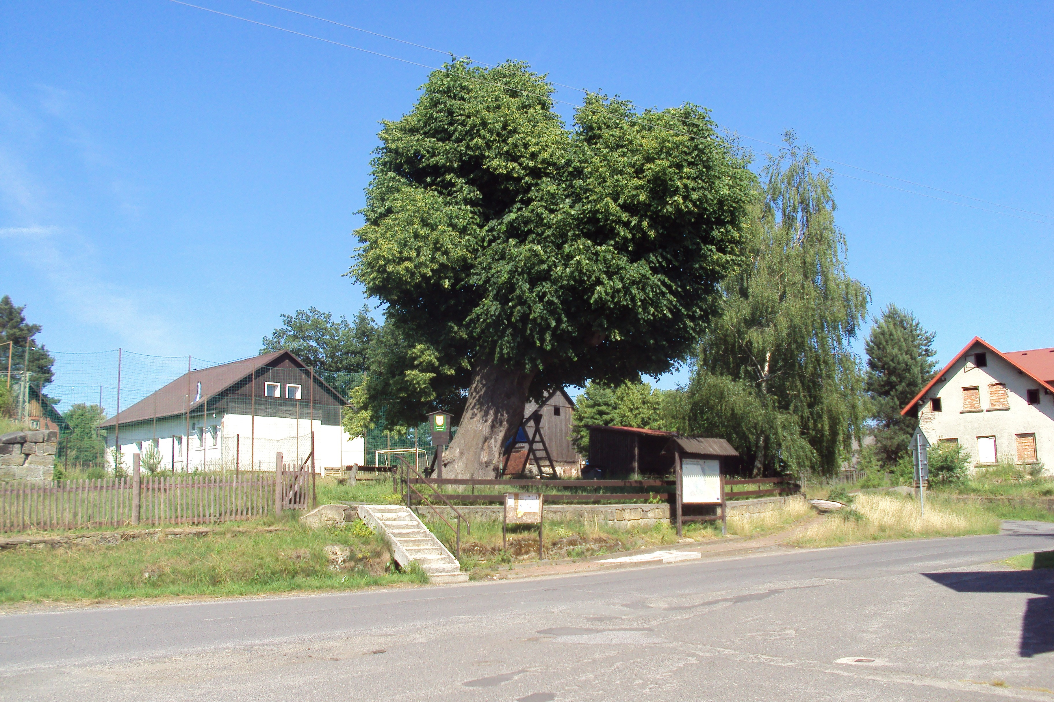 Chráněná lípa uprostřed obce